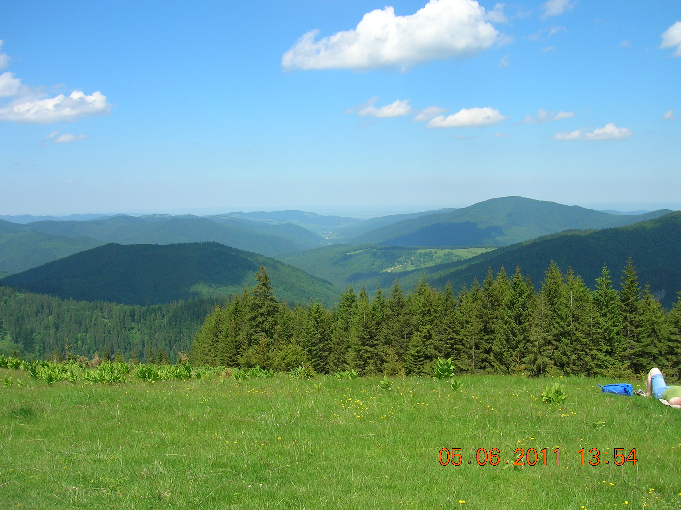 Munţii Stânişoarei (Carpaţii Orientali, România)-Lângă Pasul Stânişoara, pe culme. Centrul obiectivului este spre Mălini. Crucea Talienilor nu se vede fiind în stînga aproximativ la 1 km